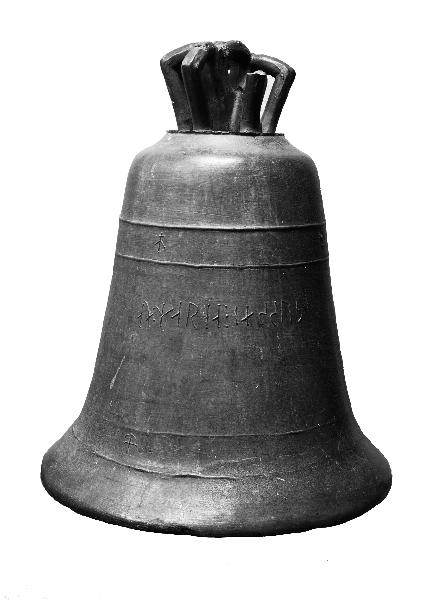 Kyrkklocka med runinskrift. Kategori: (10) KlockorKyrkklocka med runinskrift.